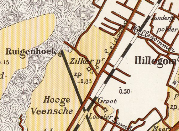 Zilkerpolder